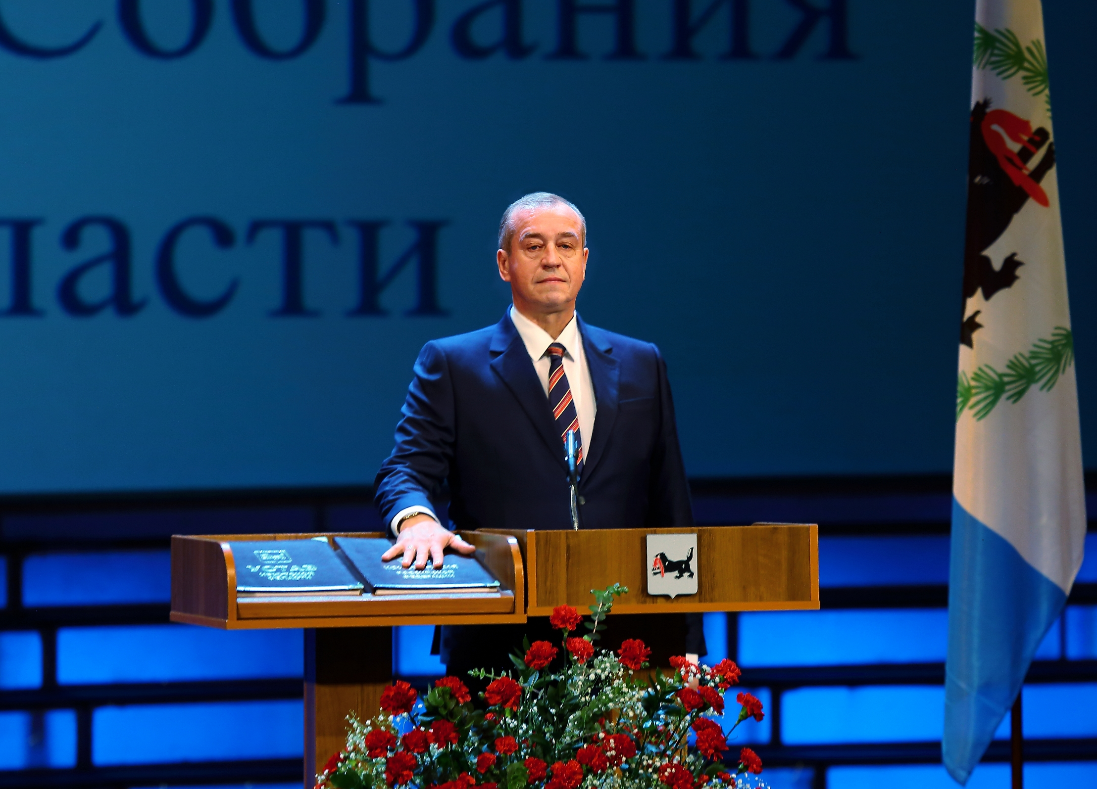 Левченко Сергей Георгиевич